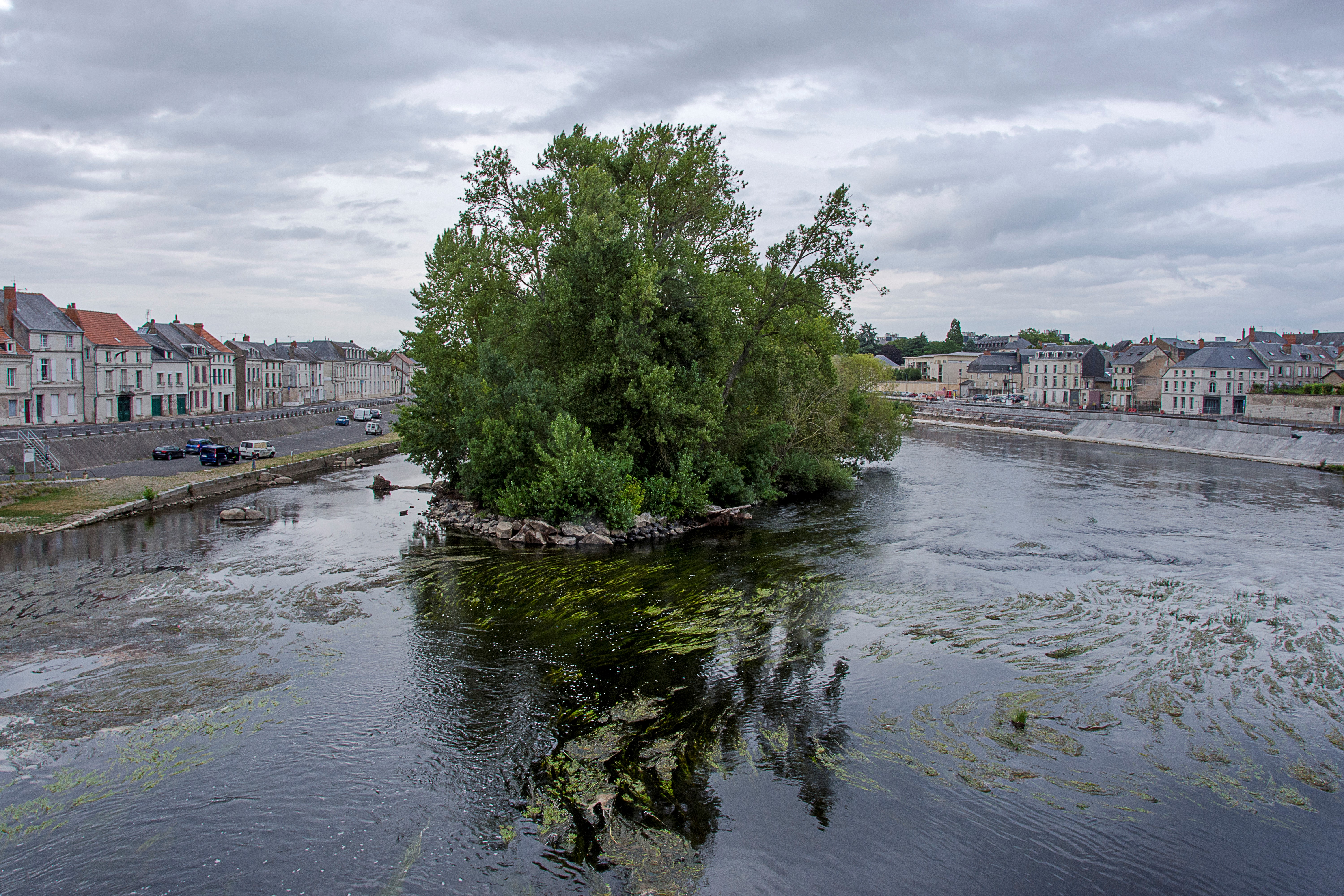 Rio Vienne a su paso por Chatellerault